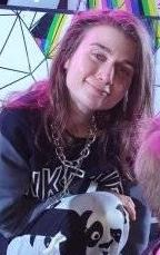 Jerry Heil